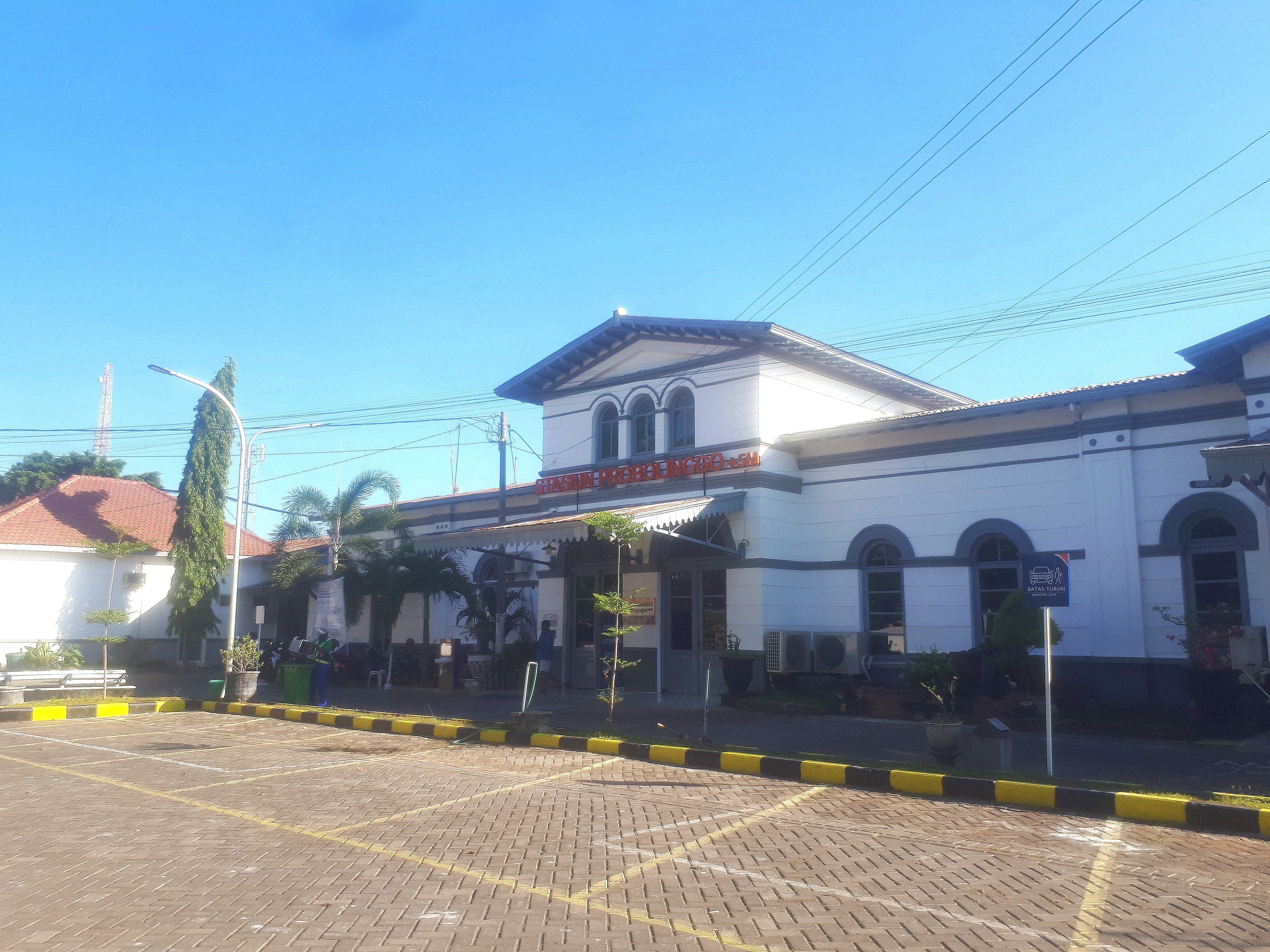 Tampak depan Stasiun Probolinggo, 2020